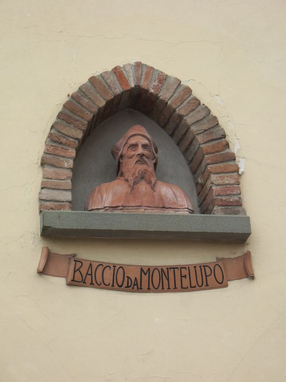 Volto di Baccio da Montelupo (terracotta del grande ceramista montelupino Lelio Rossi, incastonata nella facciata di un vecchio palazzo che affaccia su Piazza della Libertà nel centro di Montelupo Fiorentino, inaugurata il 18 giugno 1993)